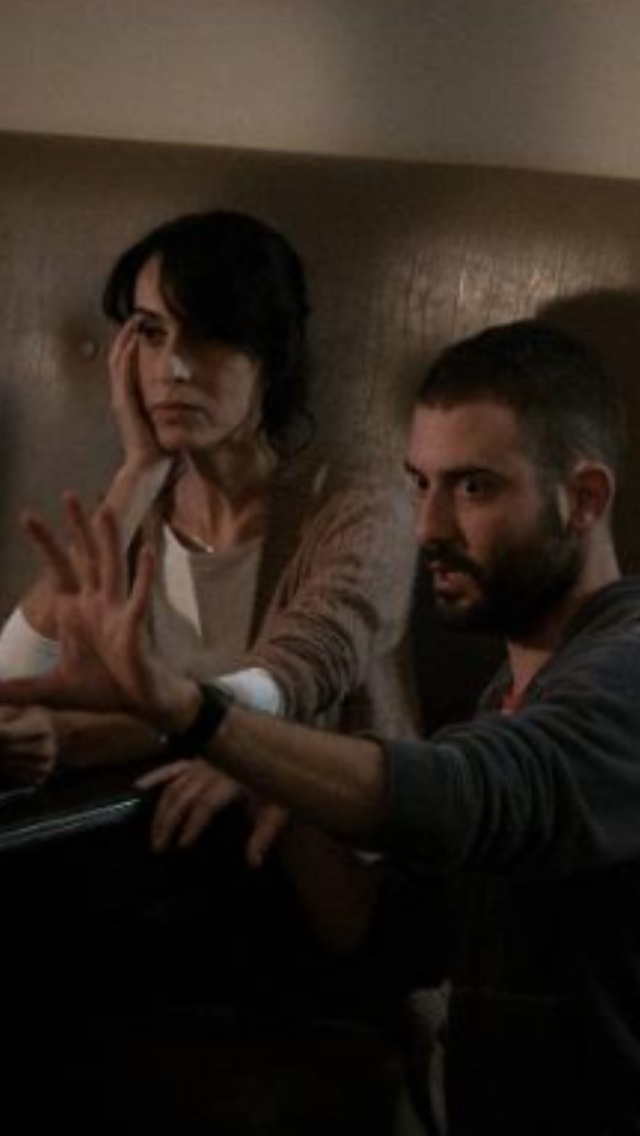 אלעד זכאי מביים את ריטה בסרט בן חוזר הביתה